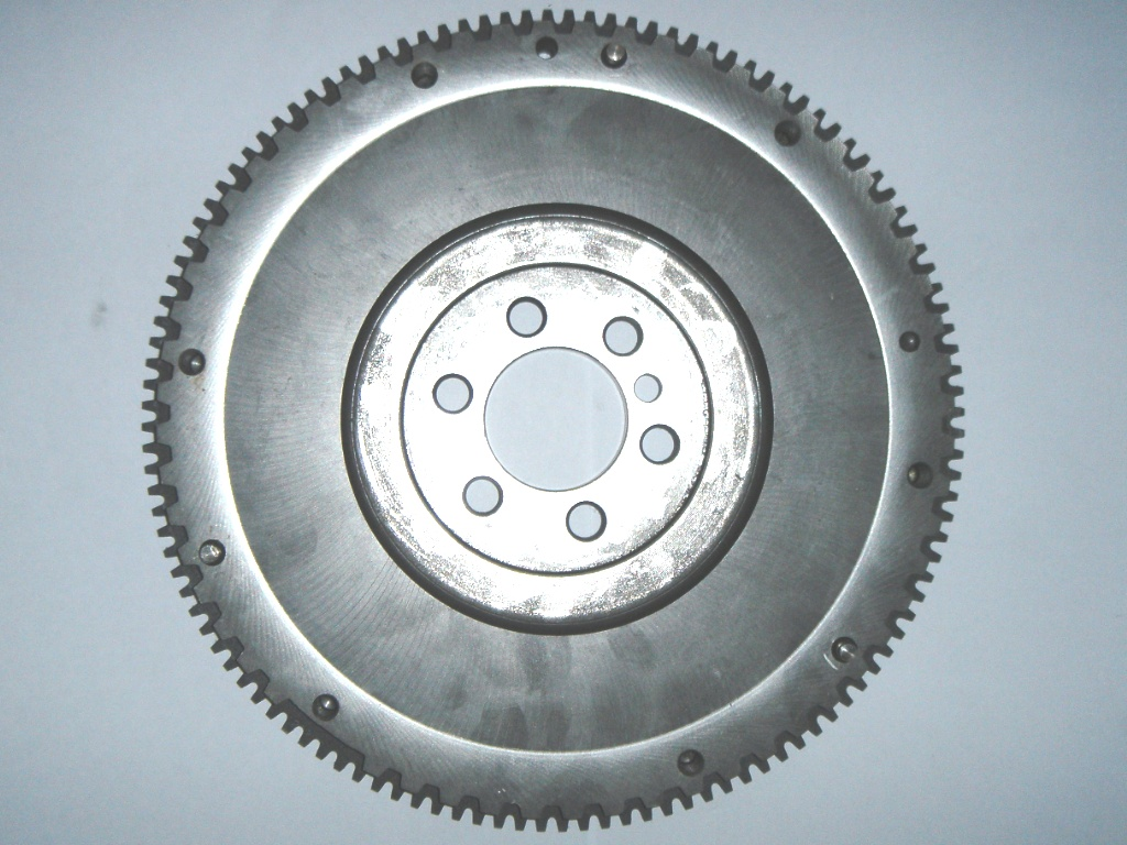 Schwungscheibe eines PKWs